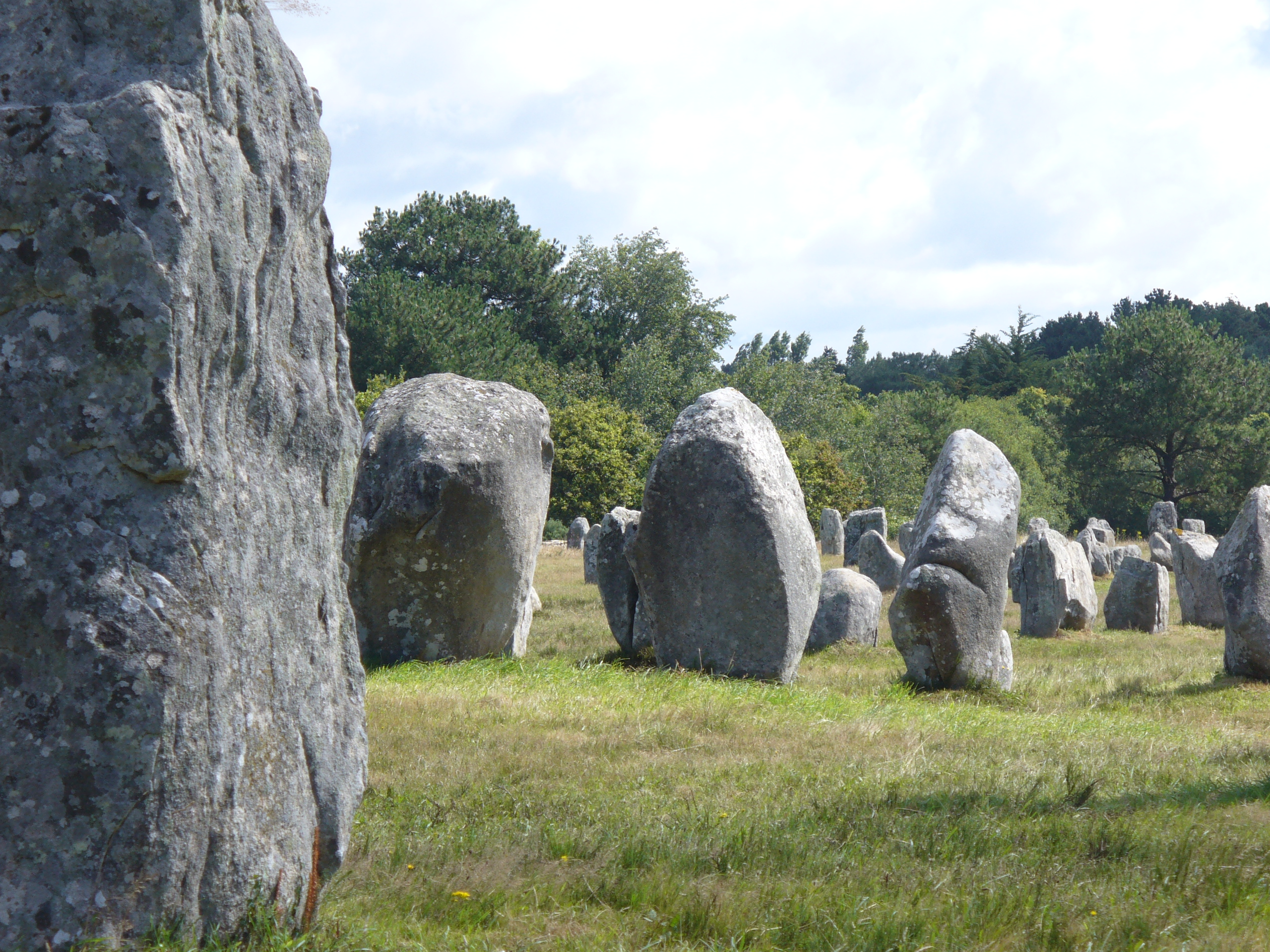 1099 Menhire,bis zu 4 Meter hoch,von Ost nach West in 1167 Meter Langen Alignements(Steinreihen) in einem Halbkreis(Cromlechs) endend. (Jungsteinzeit, Neolithikum ,Neolithic ,Néolithique 4500-2300 v.Chr.) Megalithanlage von Le Ménec, Carnac ,Departement Morbihan ,Bretagne